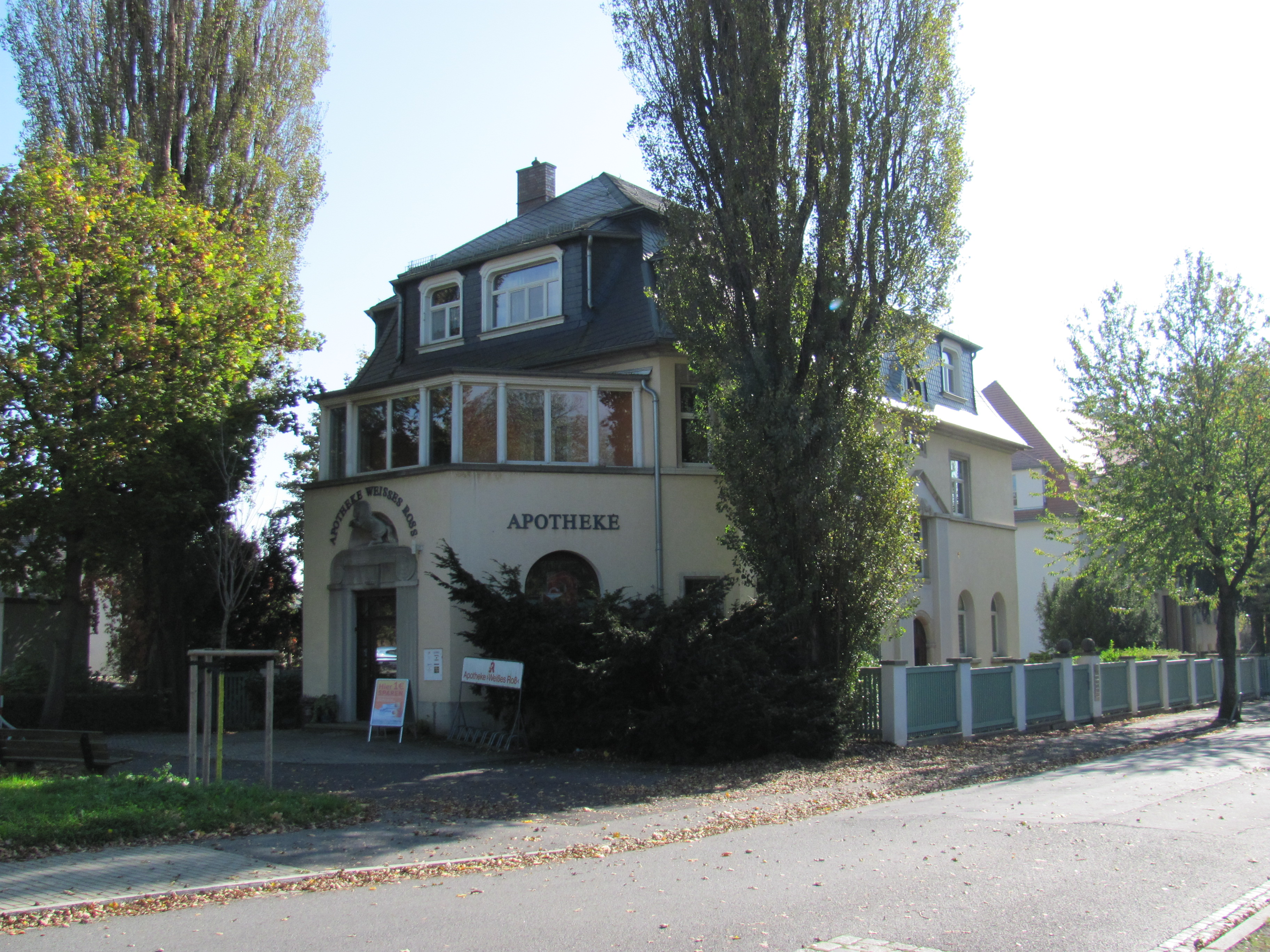 Radebeul Apotheke Weißes Roß